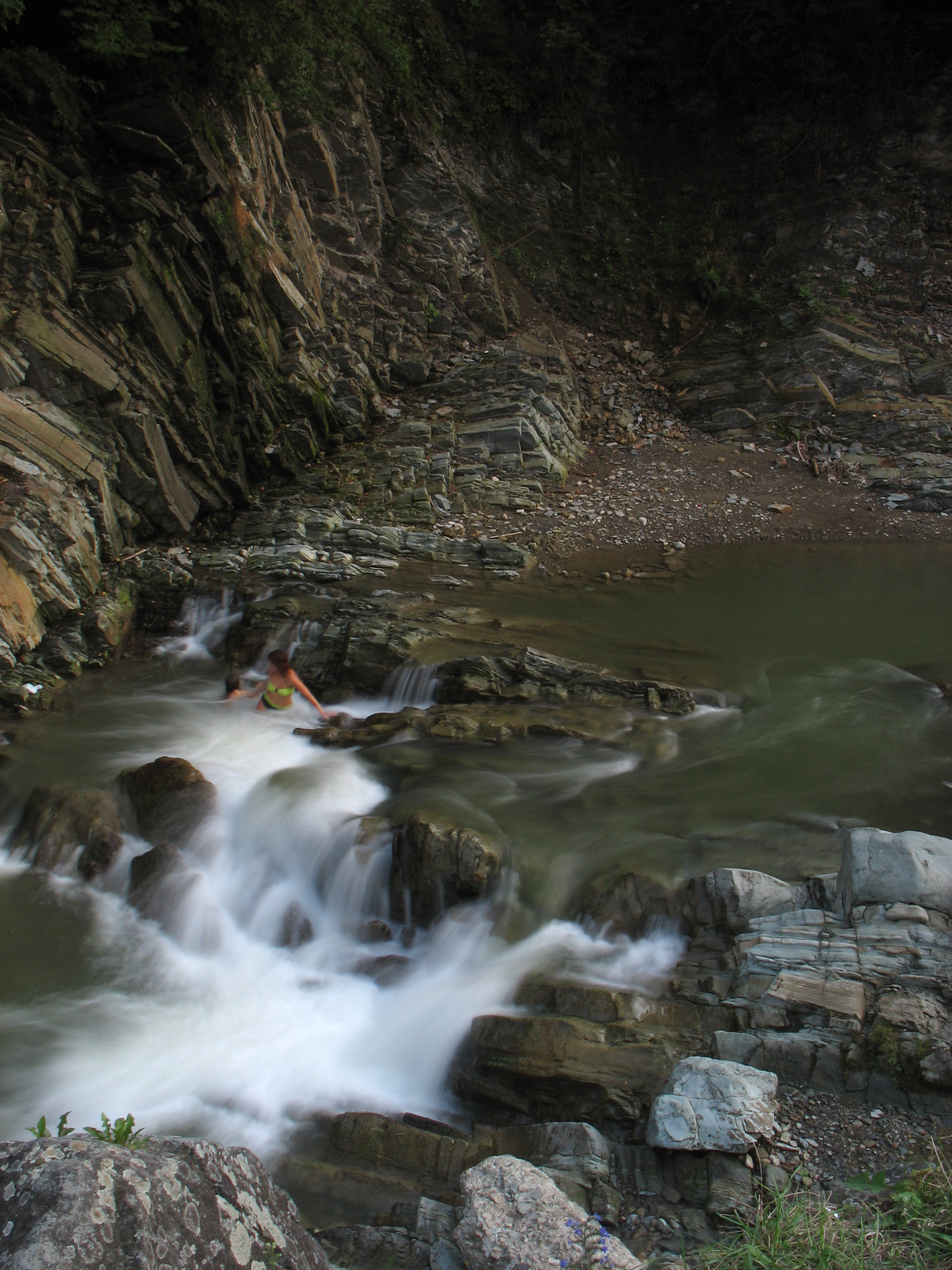 водоспад Косівський Гук